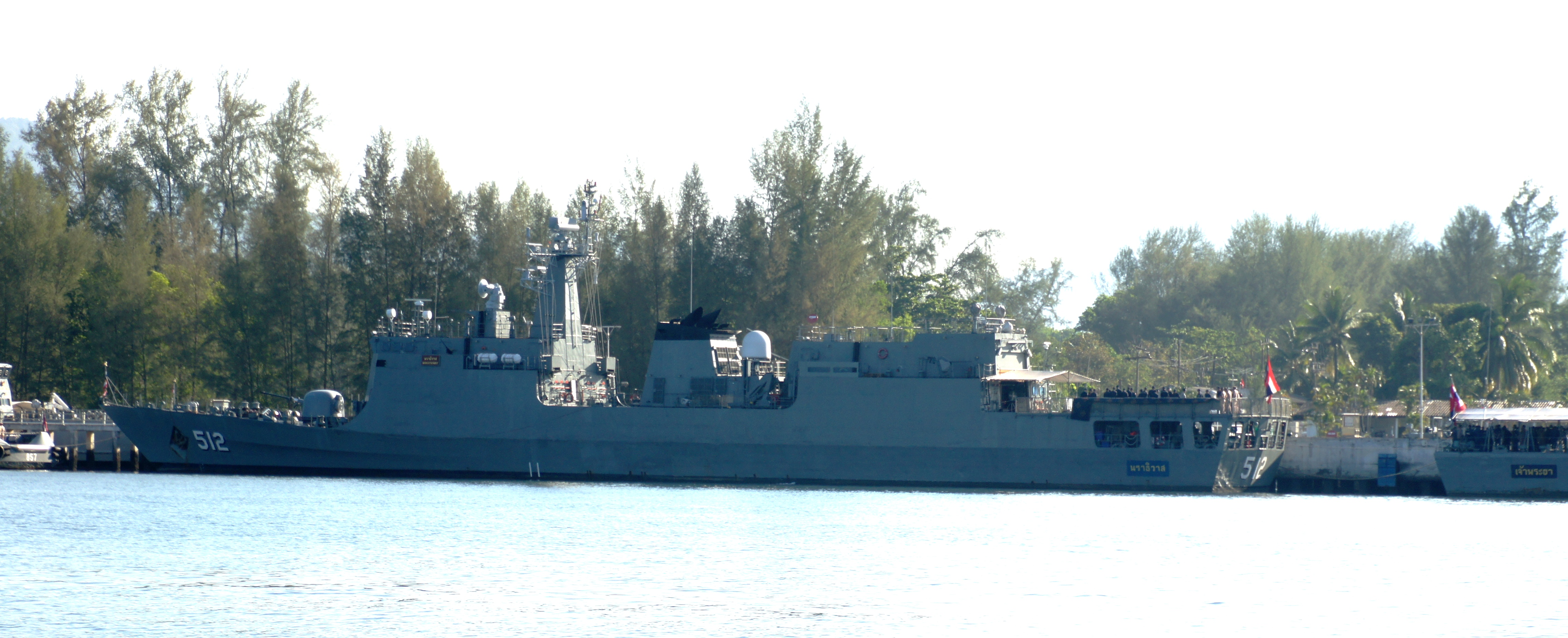 2019年2月26日，泰国海军那拉提瓦号近海巡逻舰（OPV-512）于普吉岛。